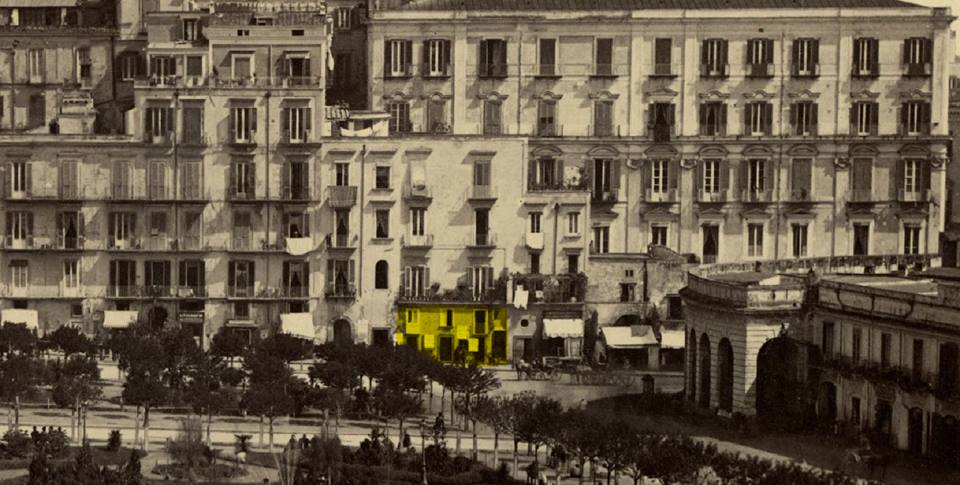 Napoli, Piazza Municipio - Il Teatro San Carlino (in giallo). Autore della foto sconosciuto.